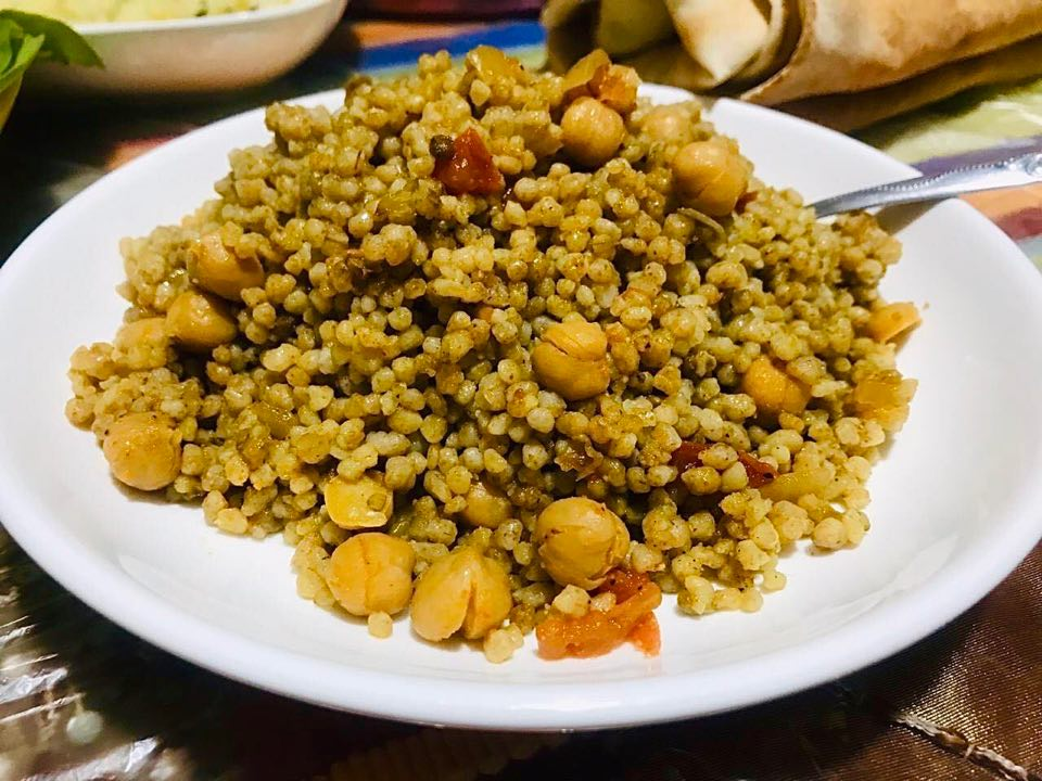 صورة لطبق (المفتول)أحد الأطباق الفلسطينيّة الشعبيّة التي تتكون من حبيبات أو كرات المفتول الصغيرة ويضاف إليها الدجاج والطماطم والحمص وهناك من يضيف القرع